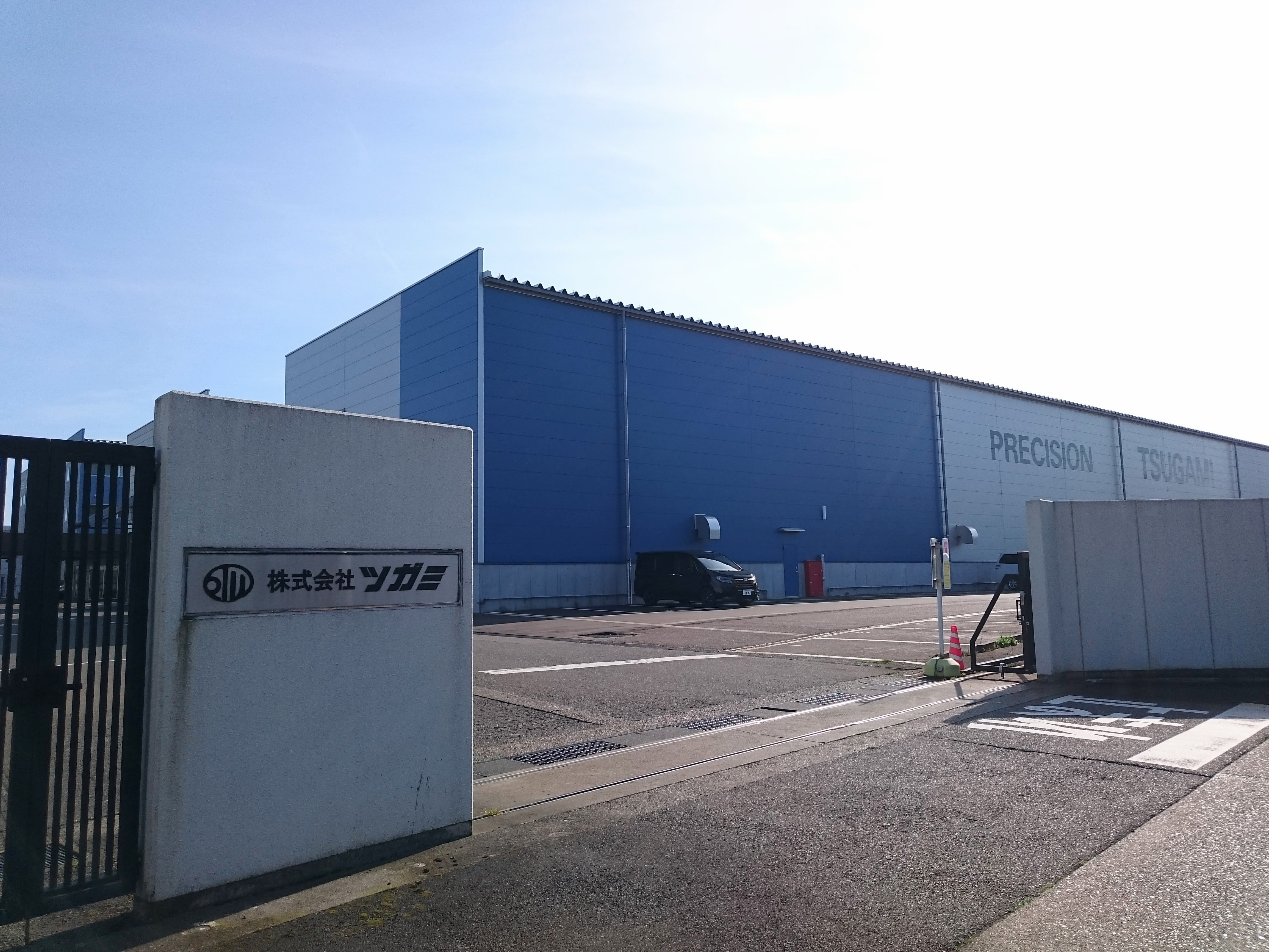 ツガミ長岡工場の外観